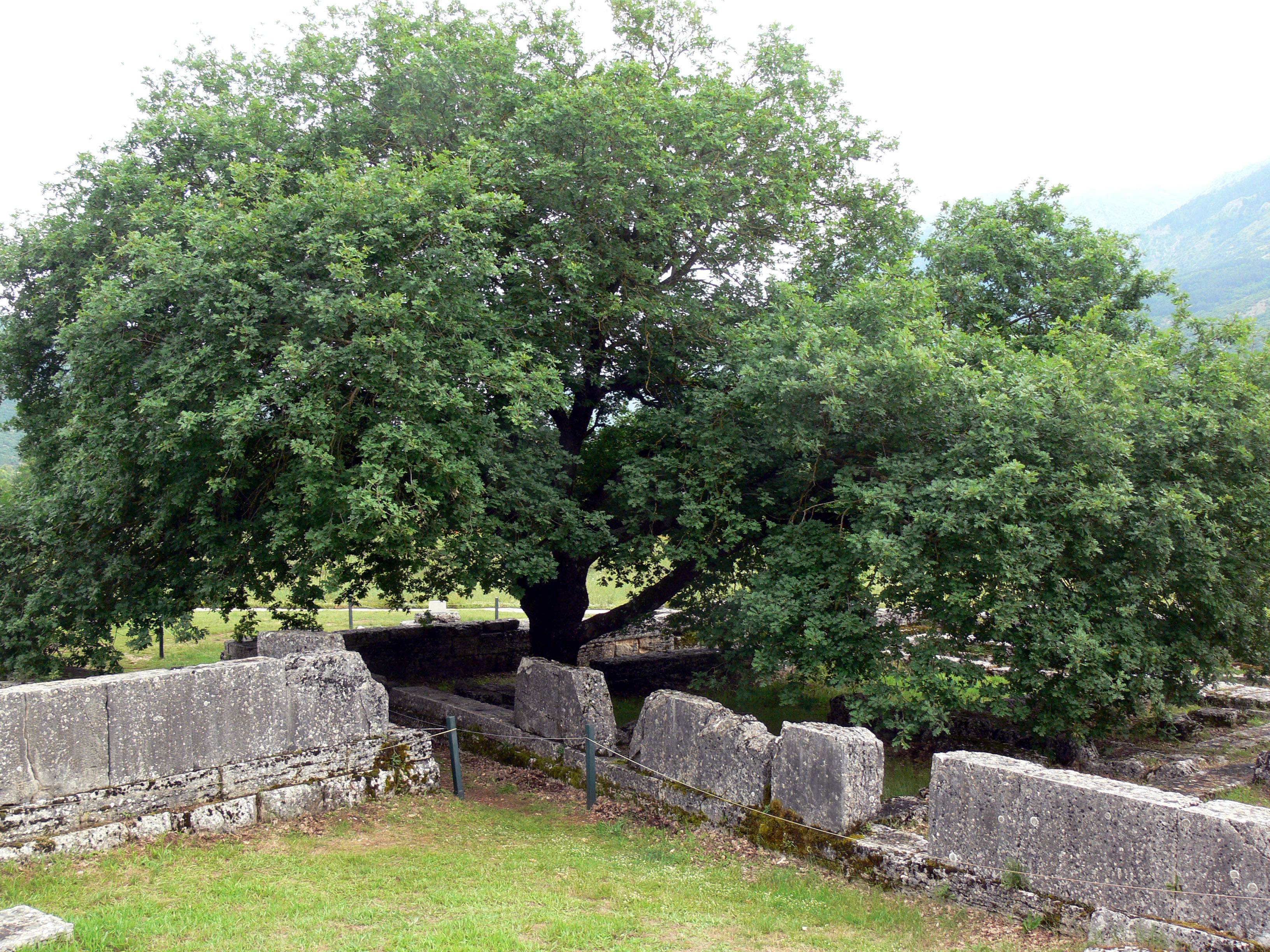 Zeusheiligum in Dodona mit Eiche